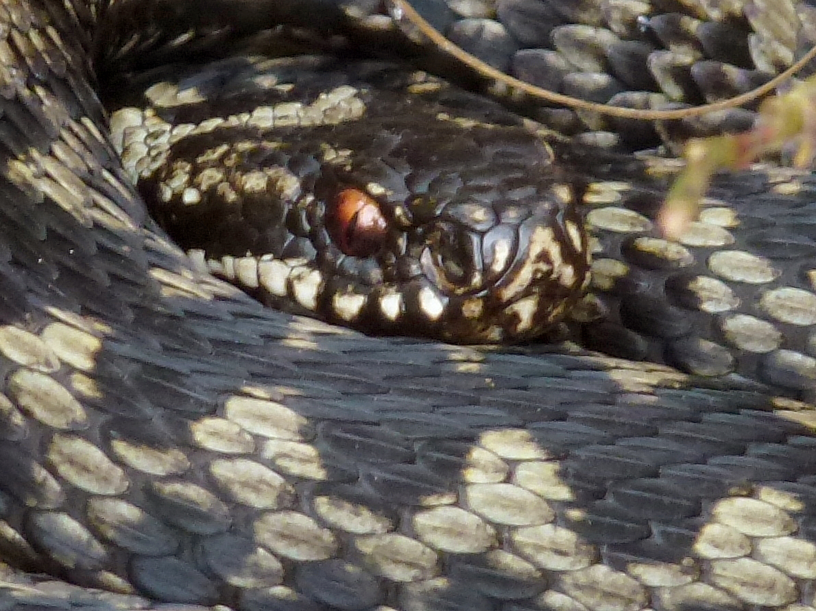 Vipera berus - Kopf und Beschuppung